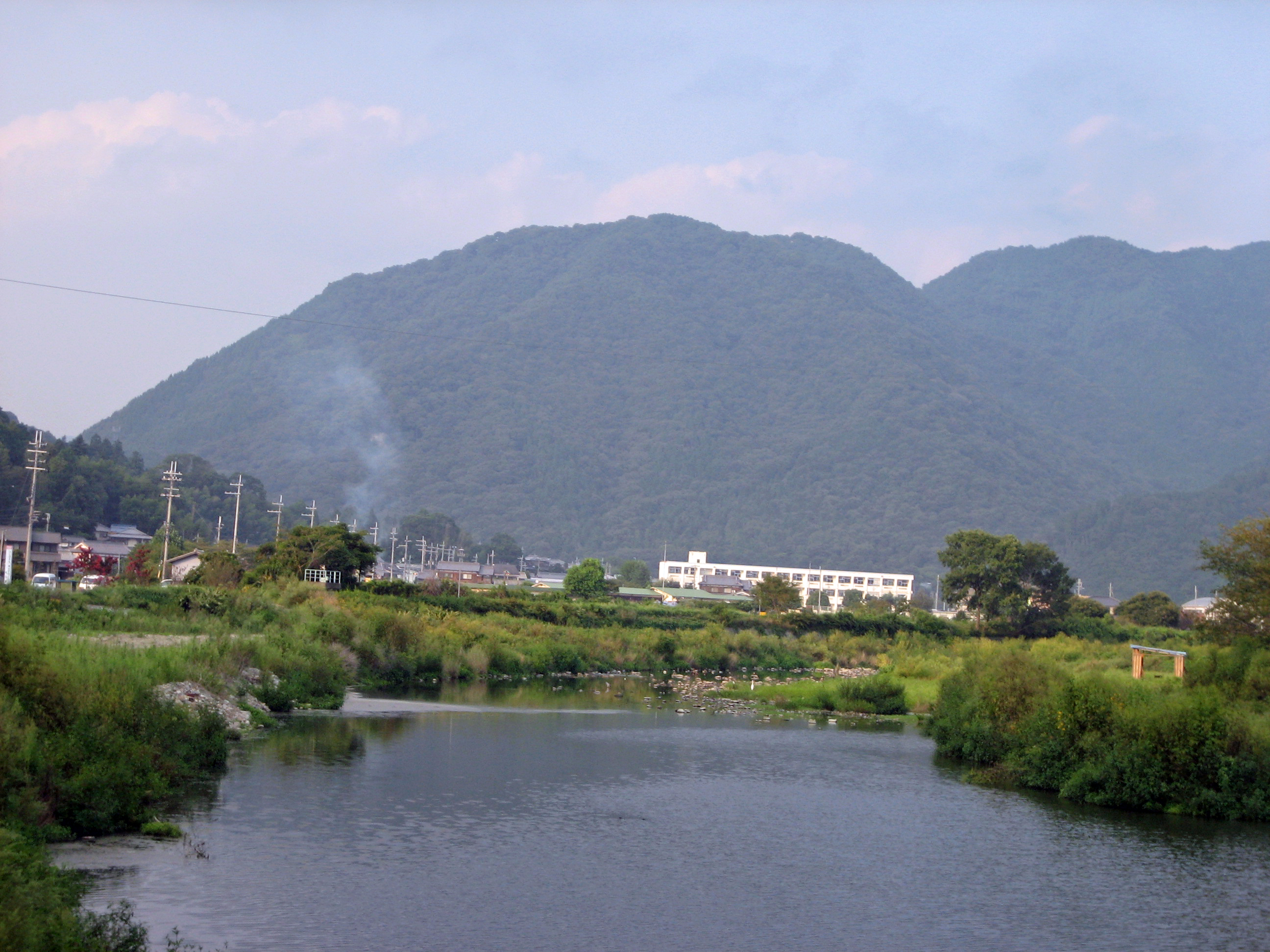 置塩城跡(中央にある山)。兵庫県姫路市より北へ10kmのところにある山城である別名「城山」とも言う。山のほぼ真西辺りにある山の麓に松安寺という赤松家の菩提寺跡があり、そこには置塩城主赤松晴政と子の赤松義祐、晴政の妹の墓などがある。